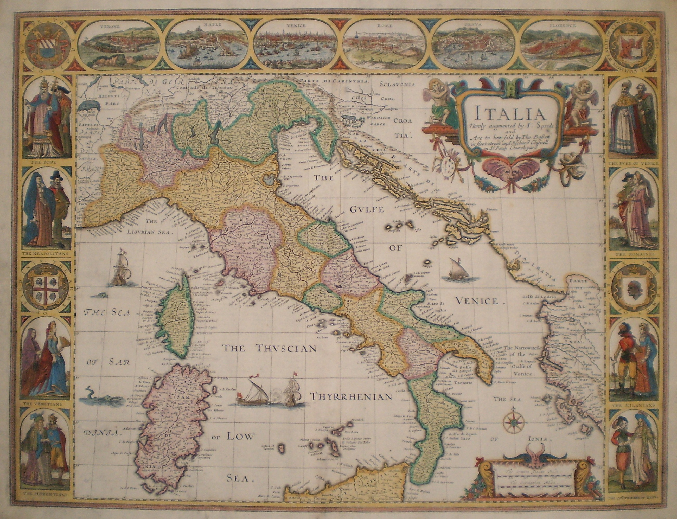 Antica mappa inglese della panisola italiana. Dall'archivio della Libreria Antiquaria Bourlot, Torino